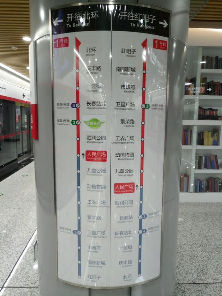 长春人民广场站线路板